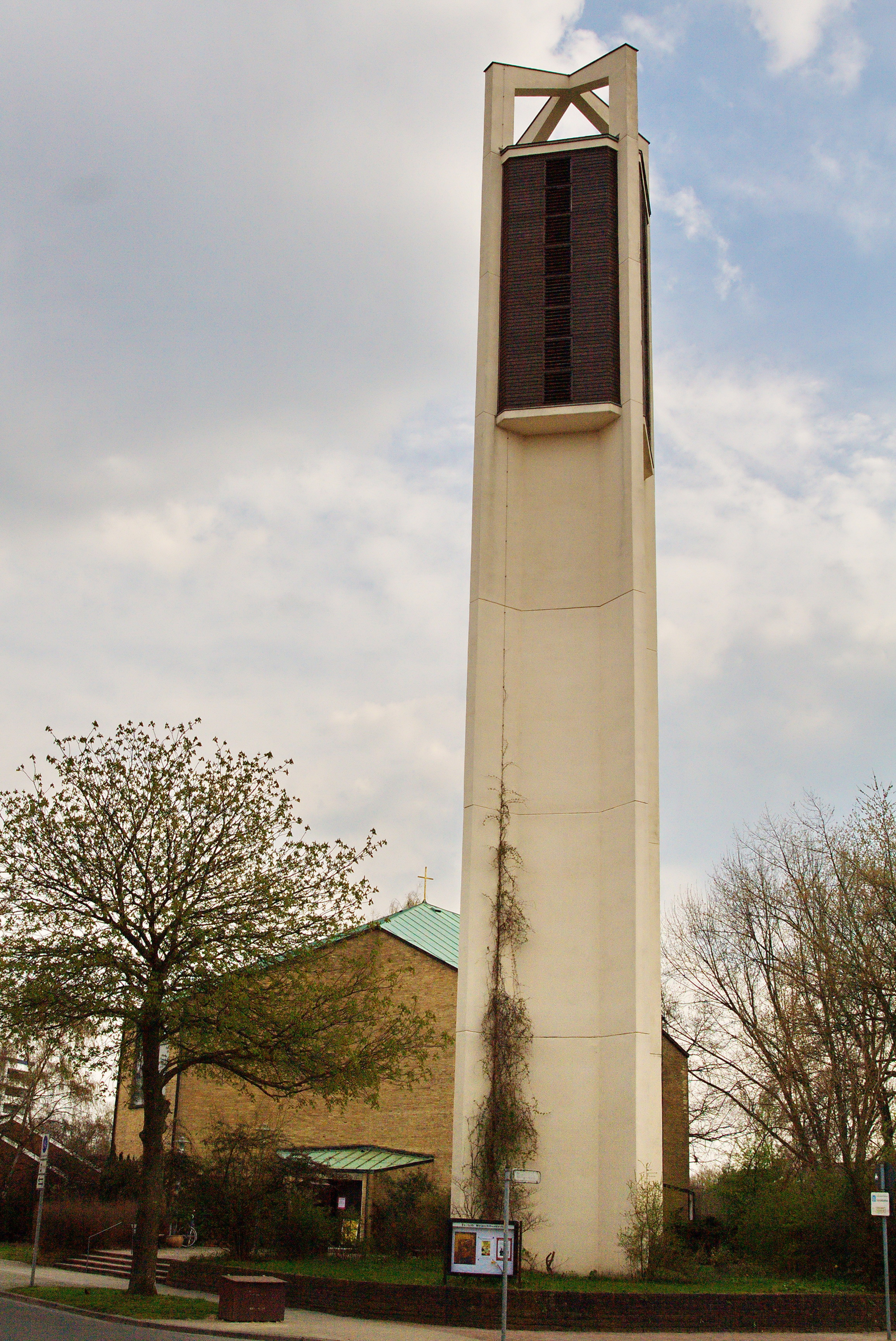 Melanchthonkirche im Stadtteil Bult (Hannover), Niedersachsen, Deutschland